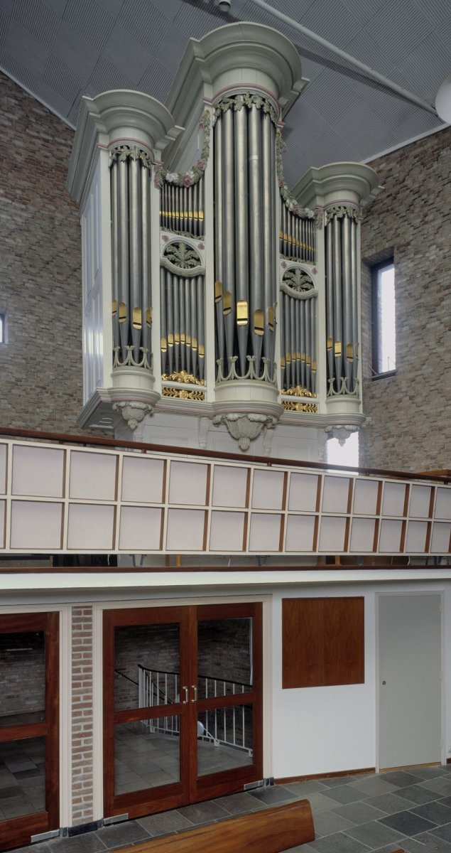 Hervormde Goede Herderkerk: Interieur, aanzicht orgel, orgelnummer 1449 (opmerking: Gefotografeerd voor Het Historische Orgel in Nederland 1858-1865)